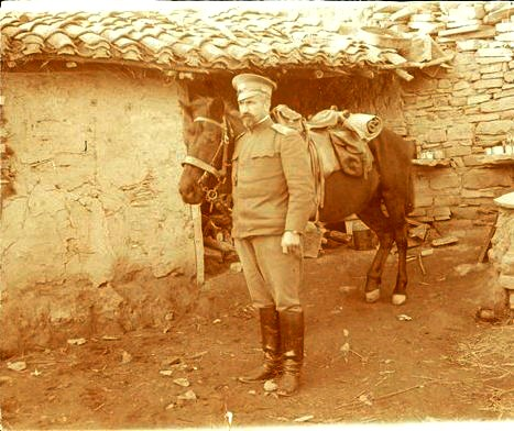 Снимка на инж. Златан Бръчков, като участник в Първата световна война в състава на ІІ-ра понтонна рота, І-ва понтонна дружина на Втора българска армия.